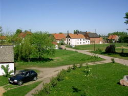 Dorfanger in Thalschütz